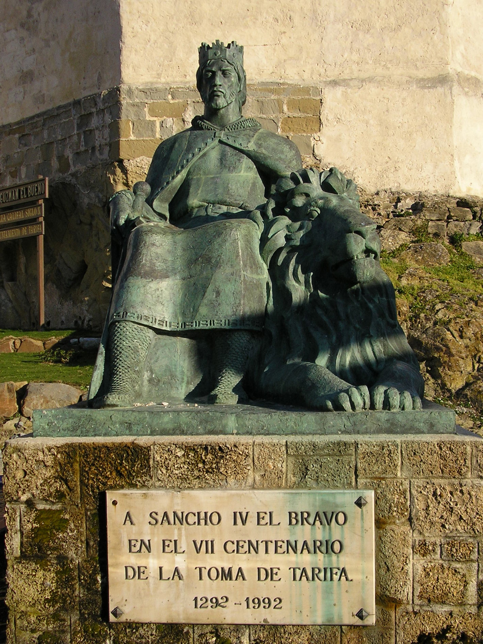 Estatua de Sancho IV a las puertas del castillo de Tarifa, España.